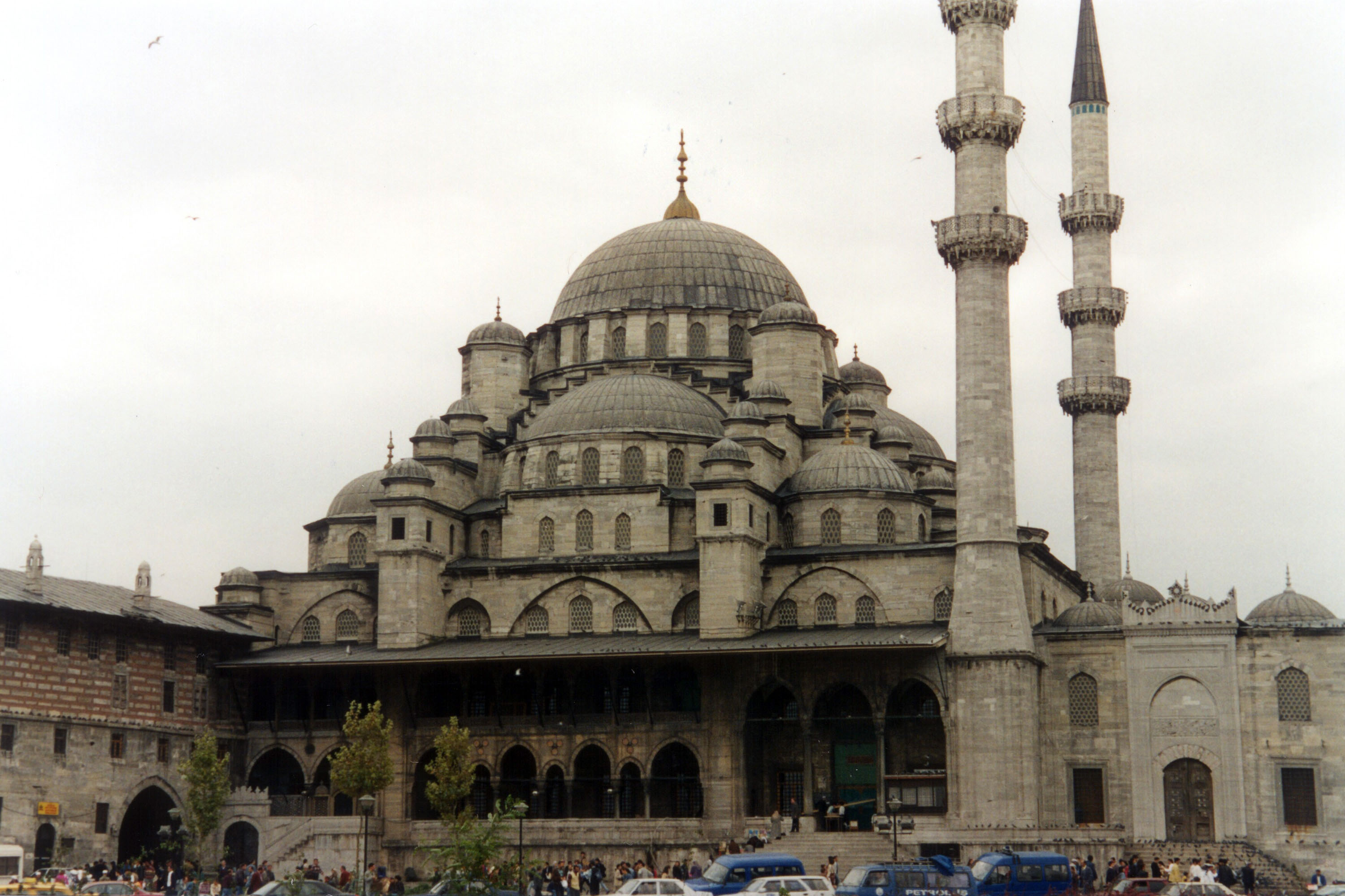 New Mosque in Istanbul (Eminönü)19951008-101500